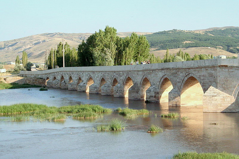 Eğri Köprü,Kızılırmak, Sivas, Turkey